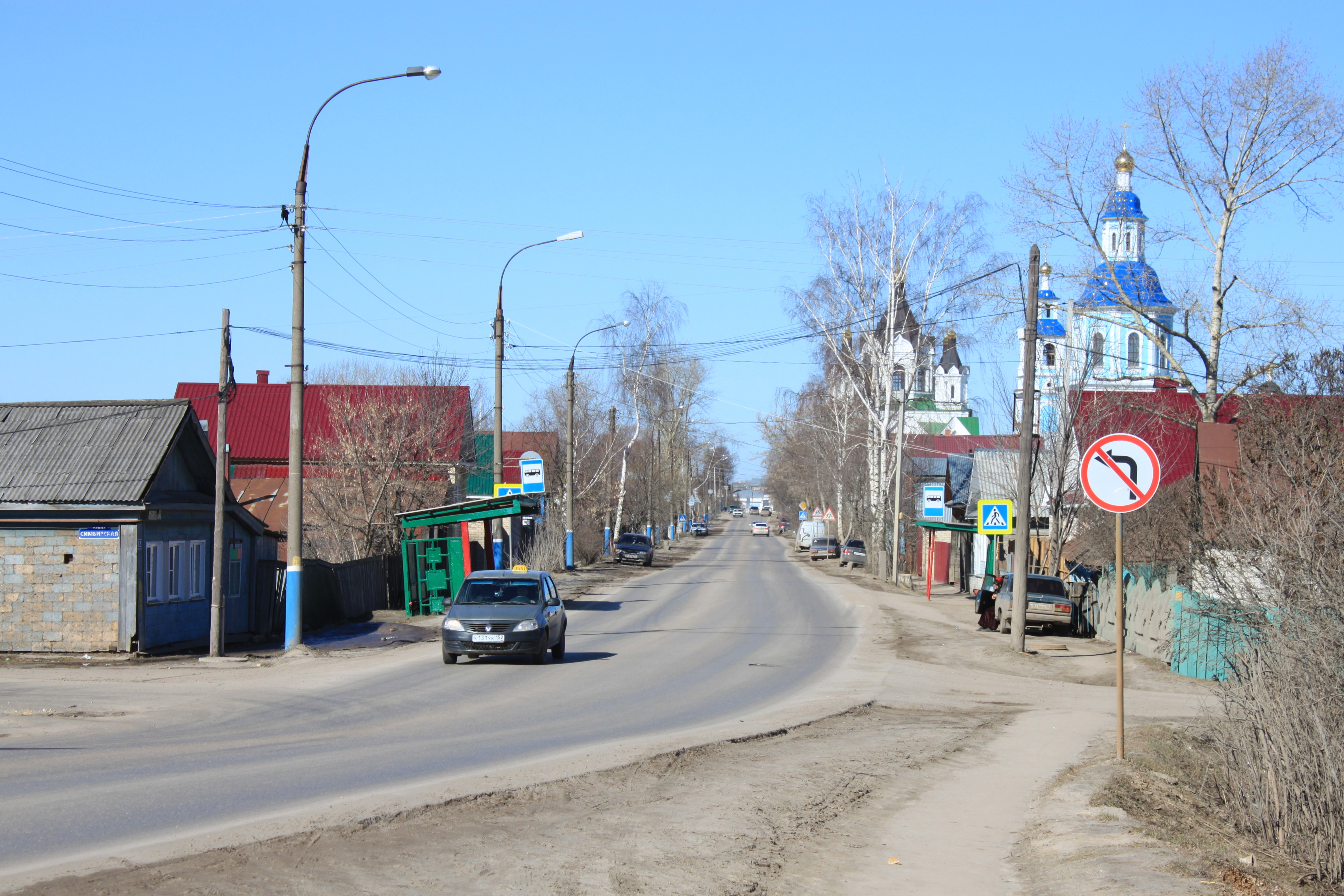 Улица Ленина Арзамас сразу после реки Шамки в сторону Нижней автостанции